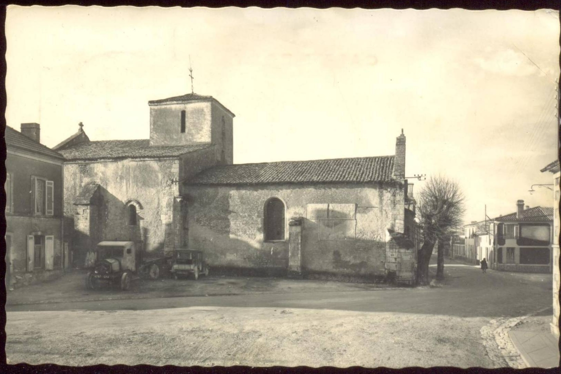 Vue de l'église de st bonnet et de la place centrale